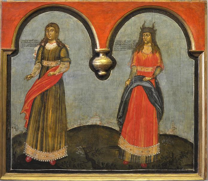 «Александр Казанцев. Сивиллы Персика и Тибуртина, икона из Николо-Набережной церкви г. Мурома»